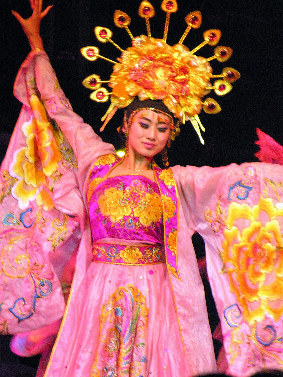 China-7310